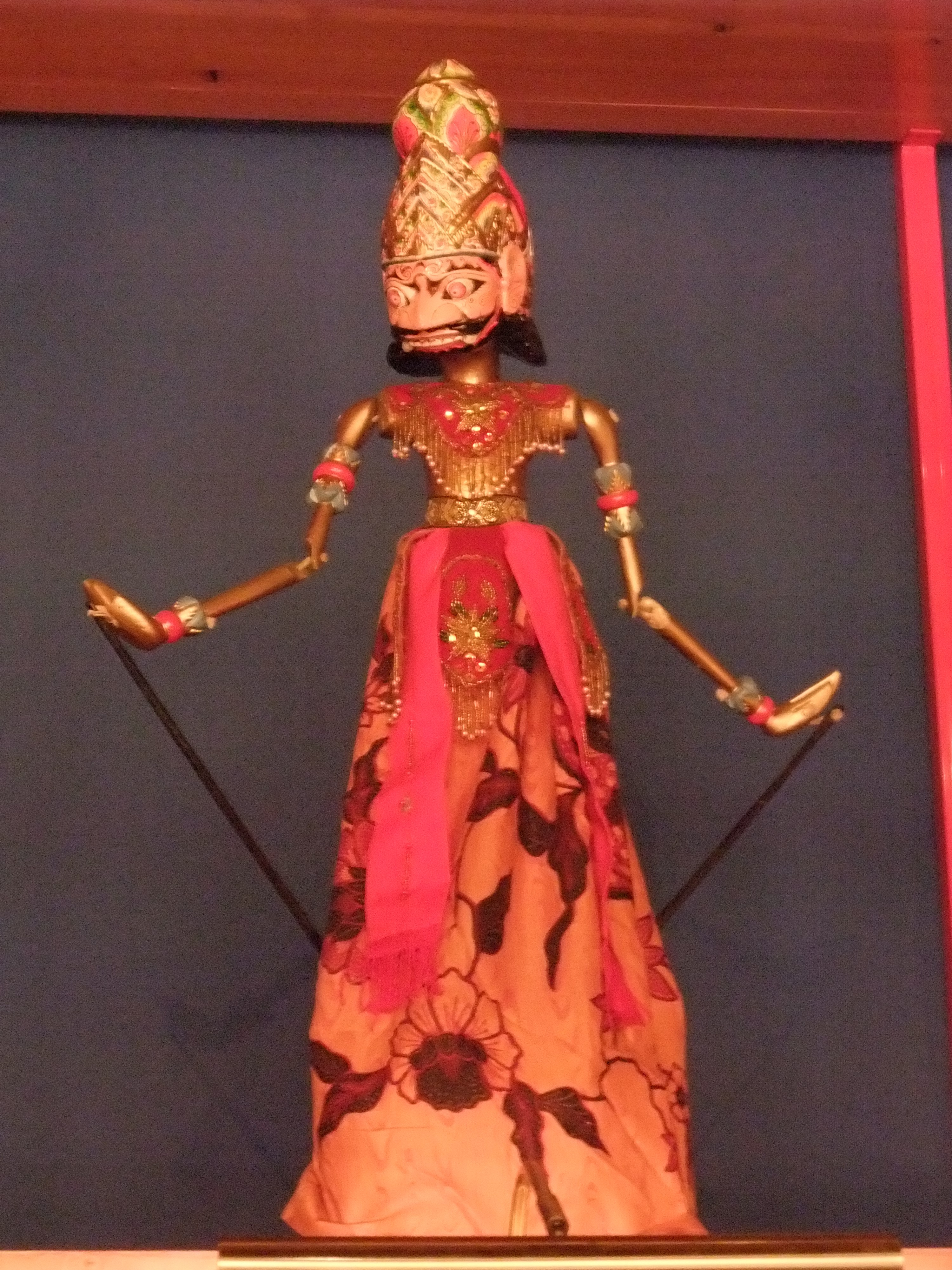 Tolosa (Guipúzcoa)-Museo Topic de títeres-17